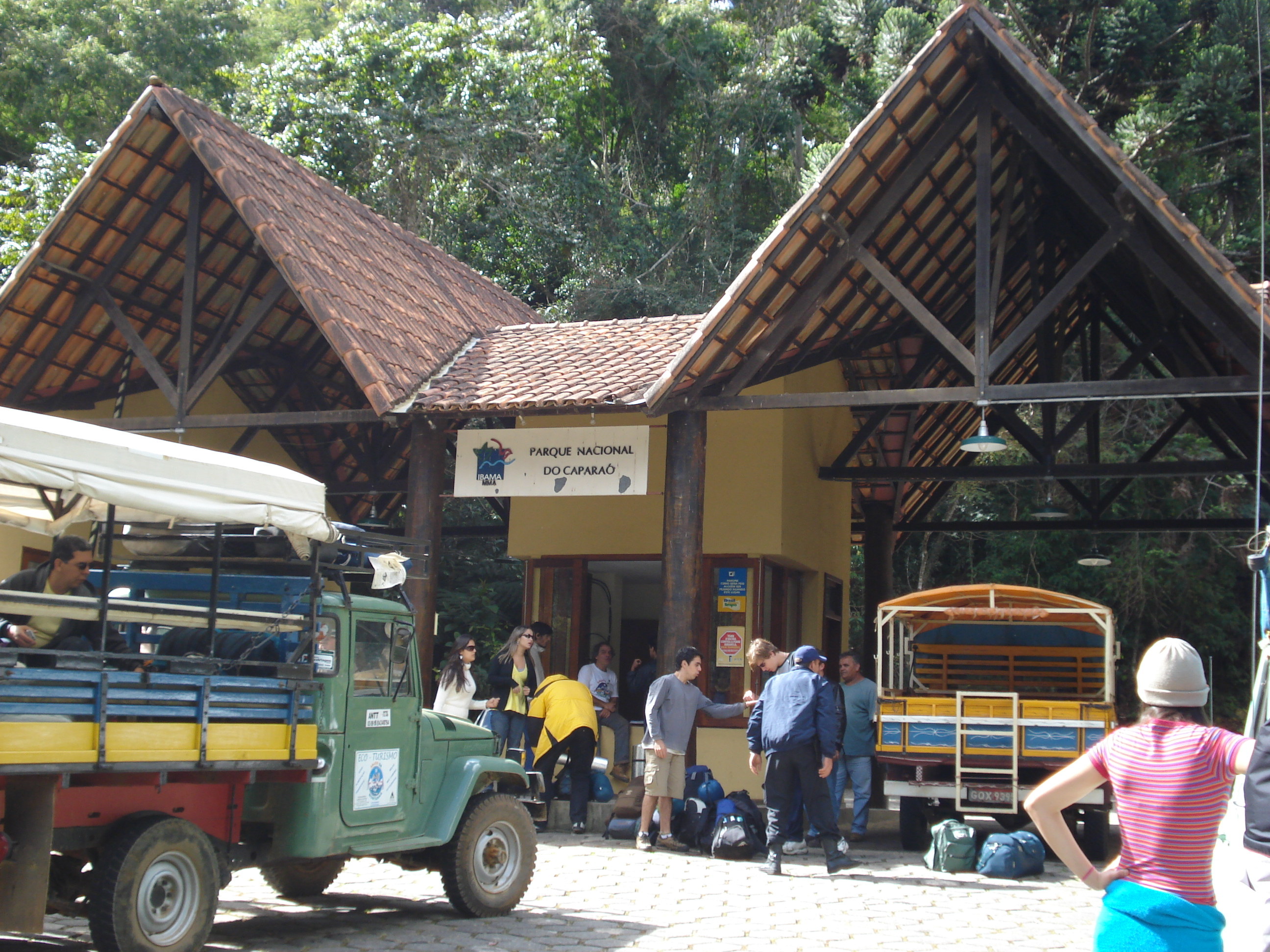 Portaria do Parque Nacional do Caparaó, em Minas Gerais, no município de Alto Caparaó.